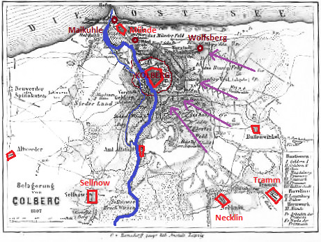 Karte aus Koenig, Robert: Der alte Nettelbeck und die Belagerung von Kolberg, Bielefeld/Leipzig: Velhagen & Klasing 1873, S. 231, digitalisierte Kopie der Digitalen Bibliothek Braunschweig, URL: bearbeitet: rot - Orte; lila - Laufgräben; braun - Festungswerke; blau - Persante